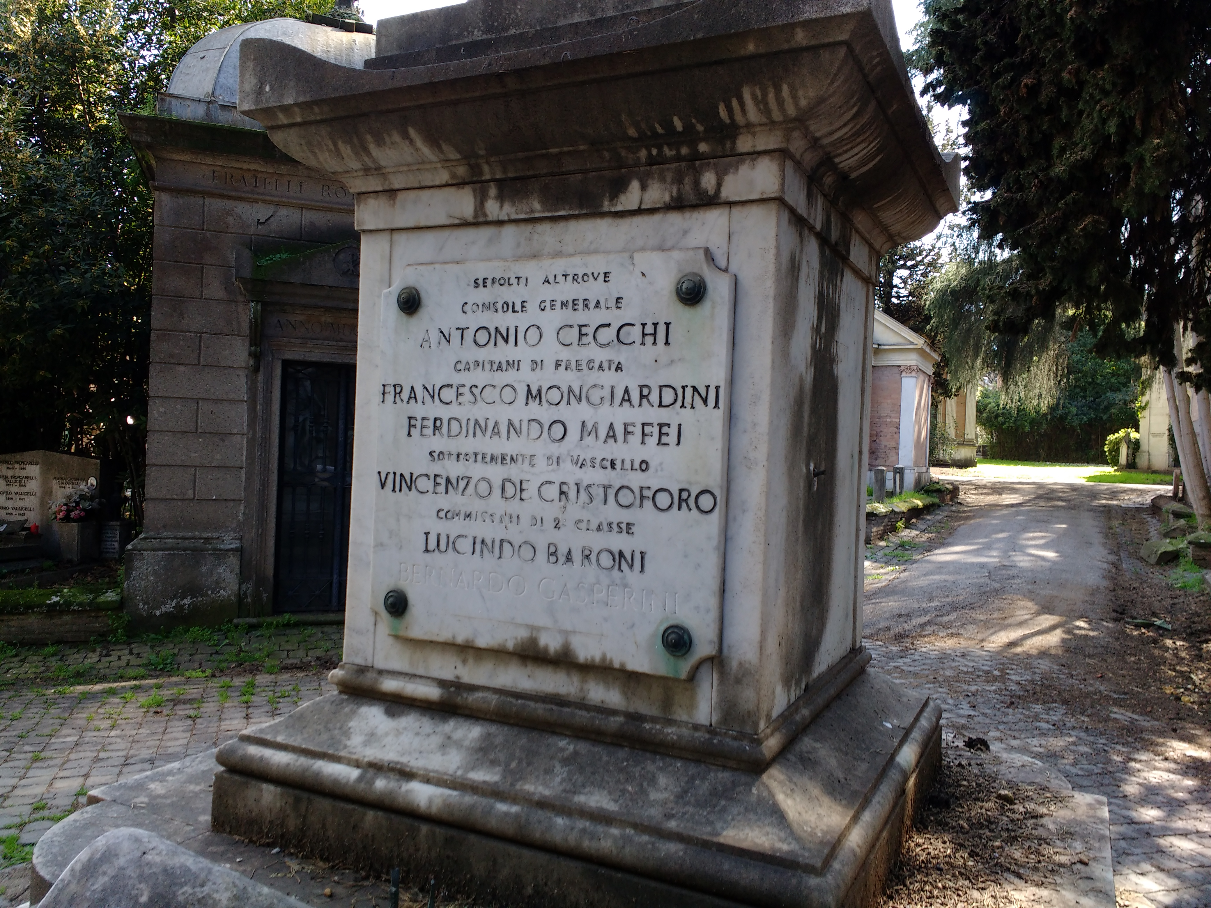 Dettaglio posto sul retro del memoriale ai caduti di Lafolè (Somalia, 1896). L'iscrizione riporta i nomi delle persone sepolte altrove: Antonio Cecchi, Francesco Mongiardini, Ferdinando Maffei, Vincenzo de Cristoforo, Lucindo Baroni e Bernardo Gasperini.